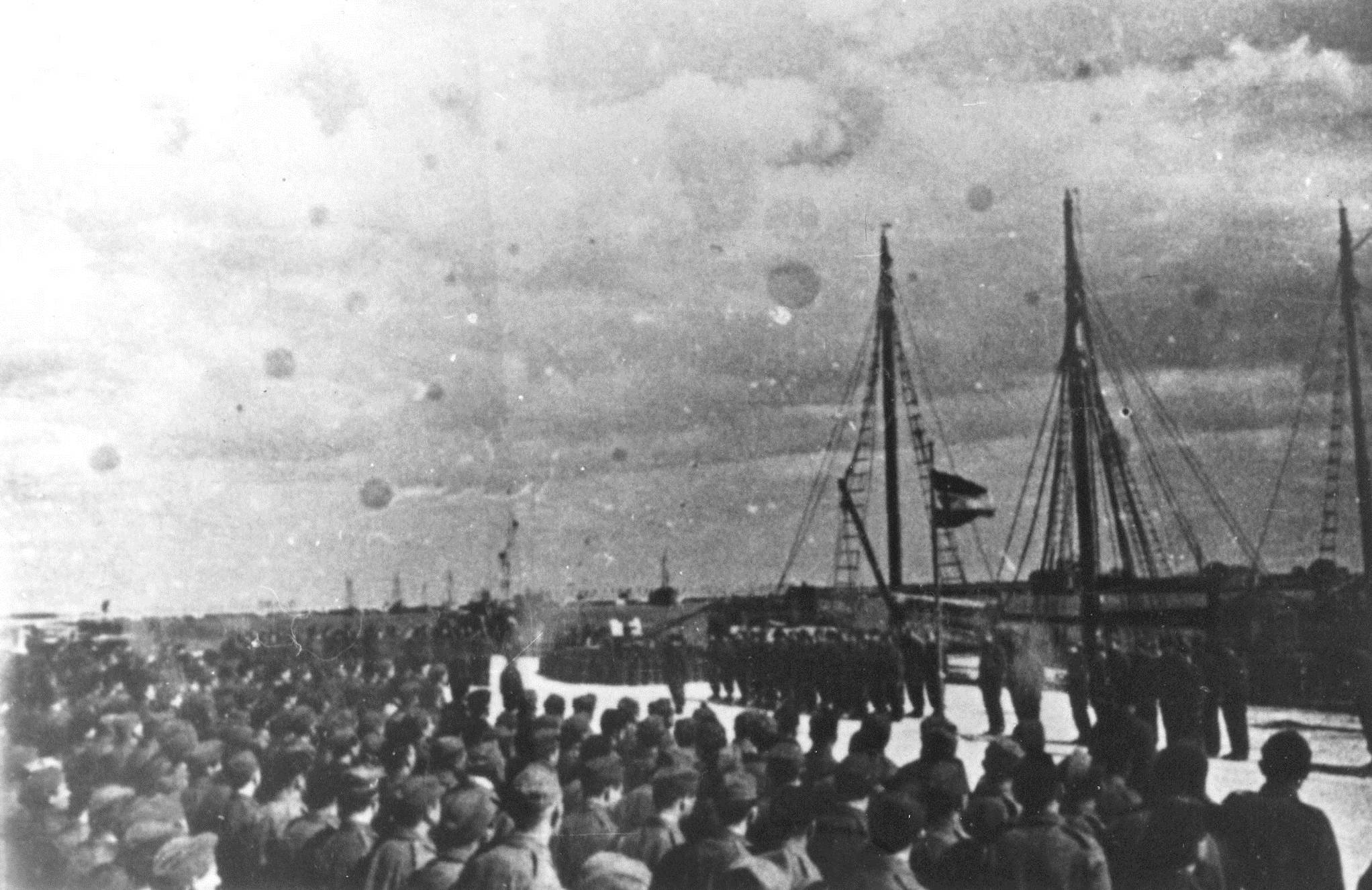 Postroj in prisega prekomorske brigade v Monopoliju 1943.